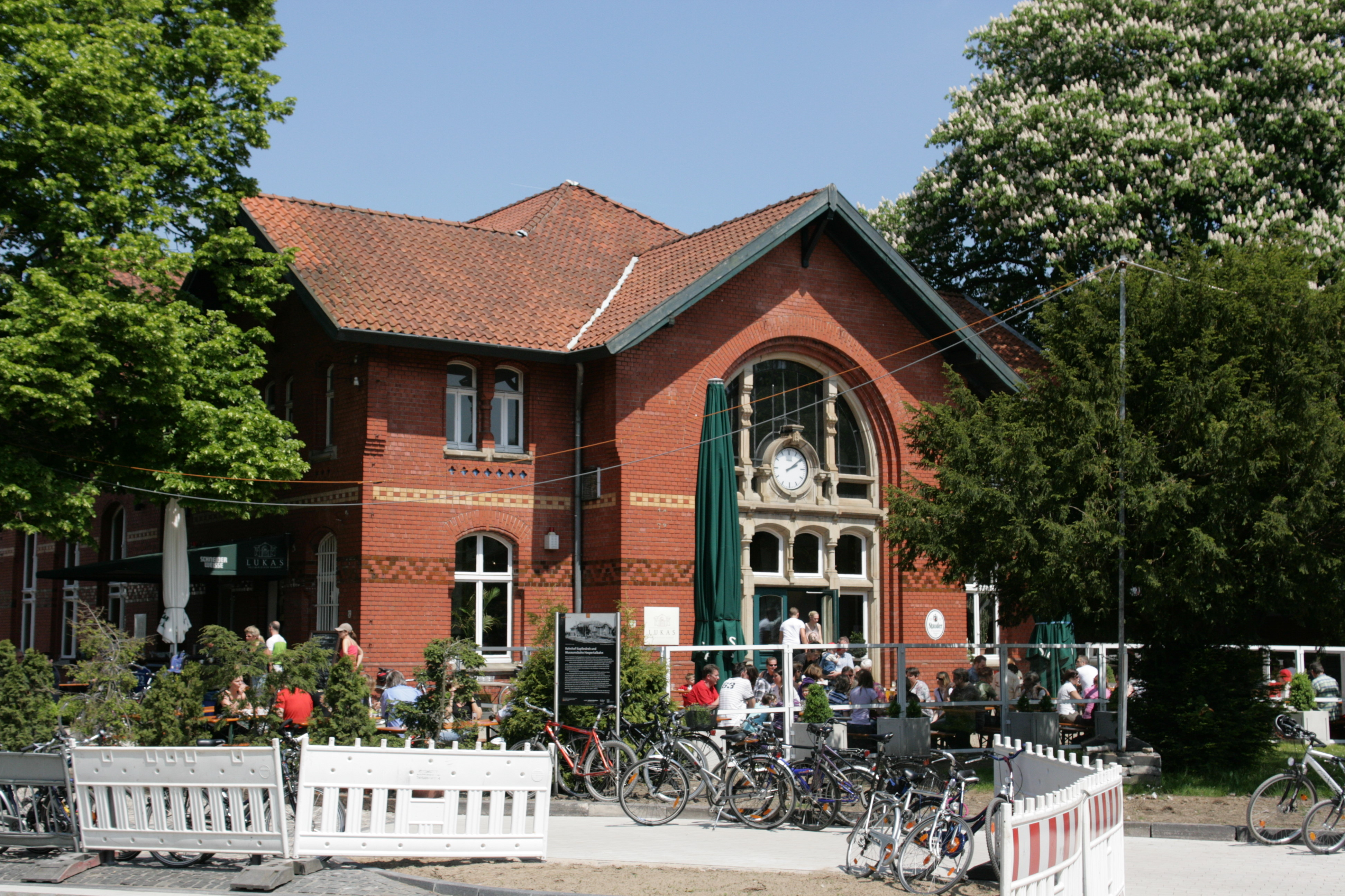 Alter Bahnhof der Ruhrtalbahn/Hespertalbahn, Prinz-Friedrich-Straße 1 in Essen-Kupferdreh